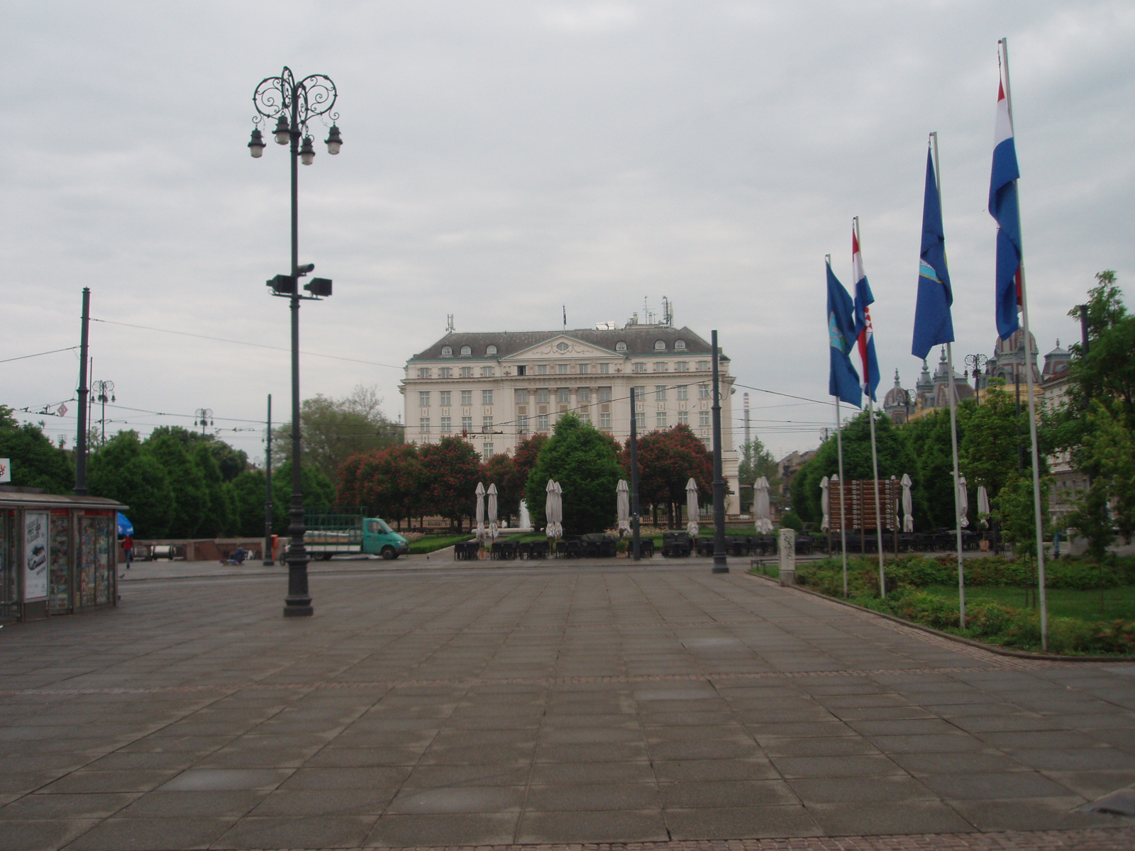 Trg kralja Tomislava - Hotel Esplanade